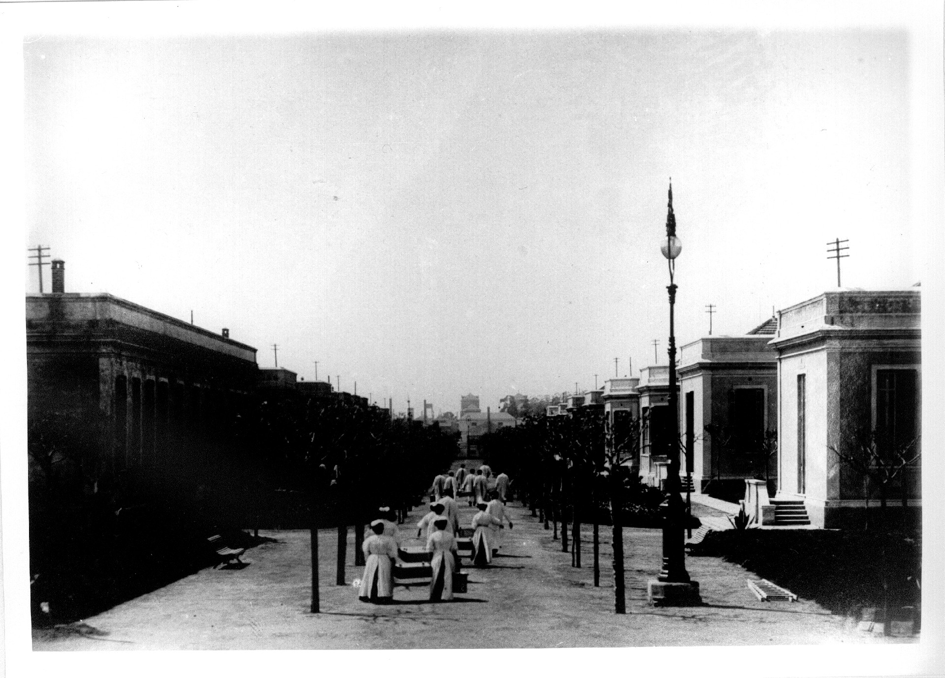 Vista de la Avenida Central del Hospital de Infectología Francisco Muñiz, en Buenos Aires. Vista desde el este hacia el oeste, con los pabellones para enfermos tuberculosos flanqueando la avenida, y un grupo de enfermeras haciendo la recorrida.